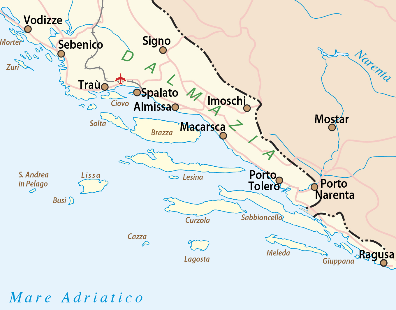 Mappa della Dalmazia - Croazia meridionale